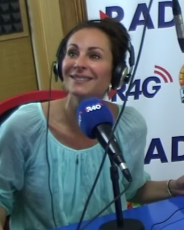 Ana Milán ha visitado La Jungla 4.0 de Abellán para presentar su nuevo libro Voy a llamar a las cosas por tu nombre..